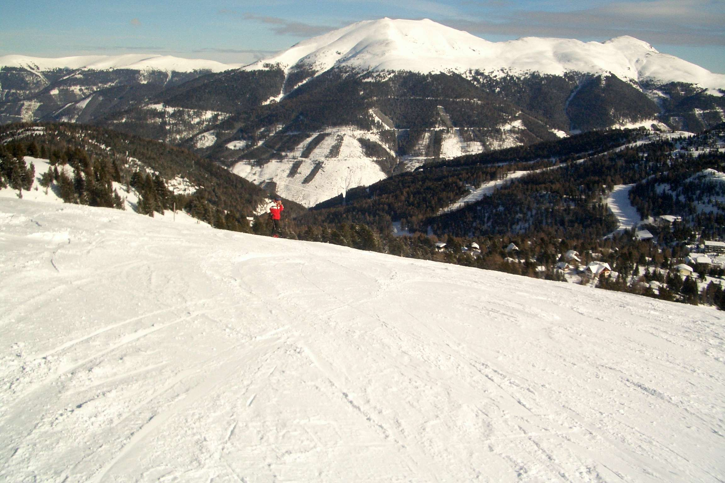 Turracher Höhe: Blick von der Bergstation der Kornockbahn zum Eisenhut